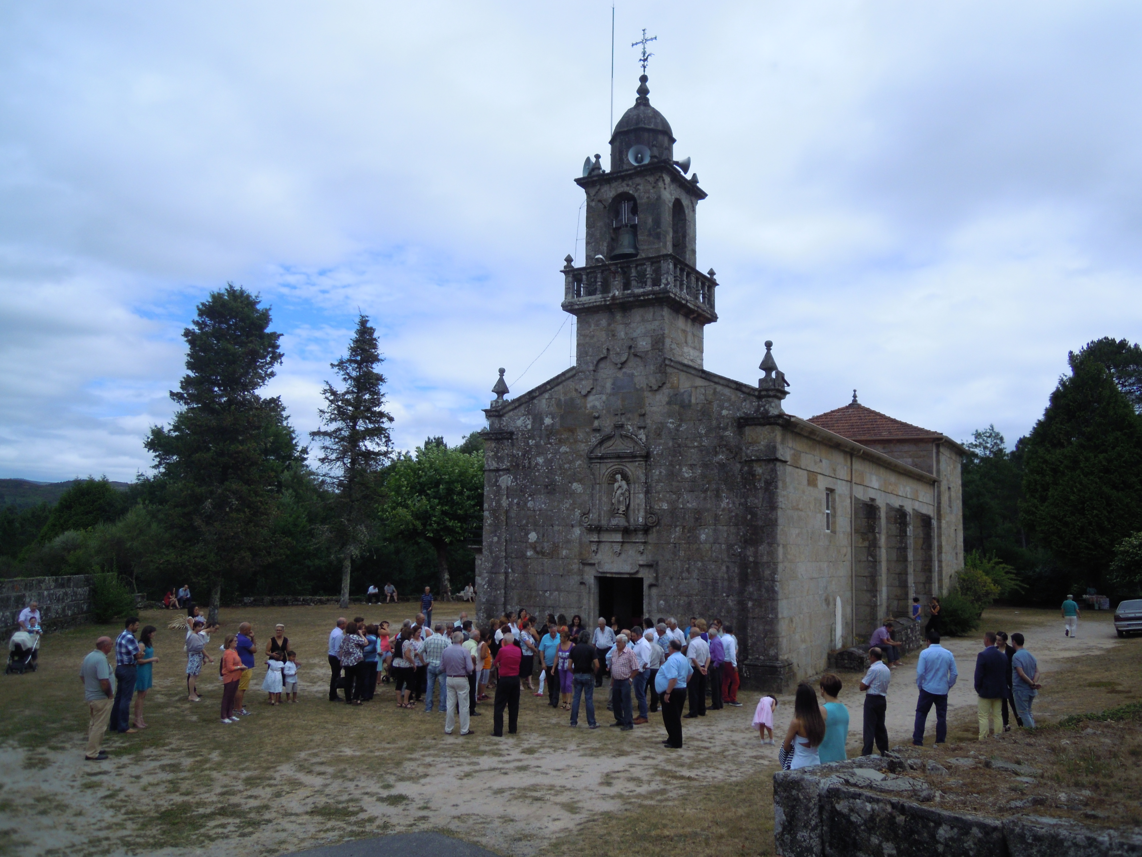 Igrexa de San Bartolomeu do Couto (A Cañiza)